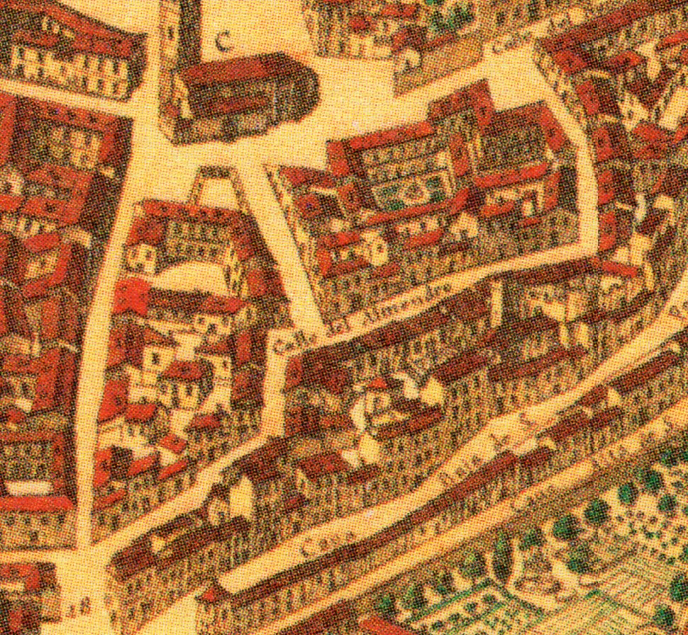 Topografía de la Villa de Madrid descrita por Don Pedro Texeira en 1656, en la cual se demuestran todas las calles al largo y ancho de cada una de ellas, las rinconadas y lo que tuercen las Plazas, fuentes, jardines y huertas con la disposición que tienen las parroquias, Monasterios y Hospitales están señalados sus nombres con letras y números que se hallaran en la tabla y los demás edificios, torres y delanteras de las casas de la parte que mira al Mediodía están sacadas al natural que se podrán tocar las puertas y ventanas de cada una de ellas.